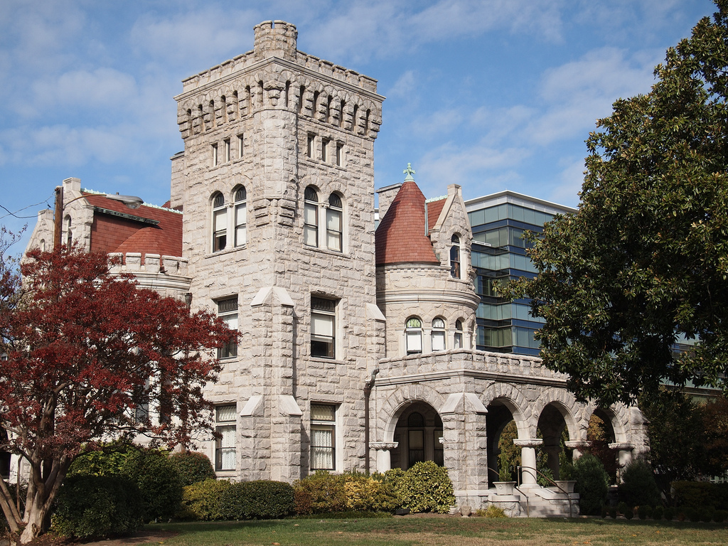 Rhodes Hall, Atlanta, Georgia